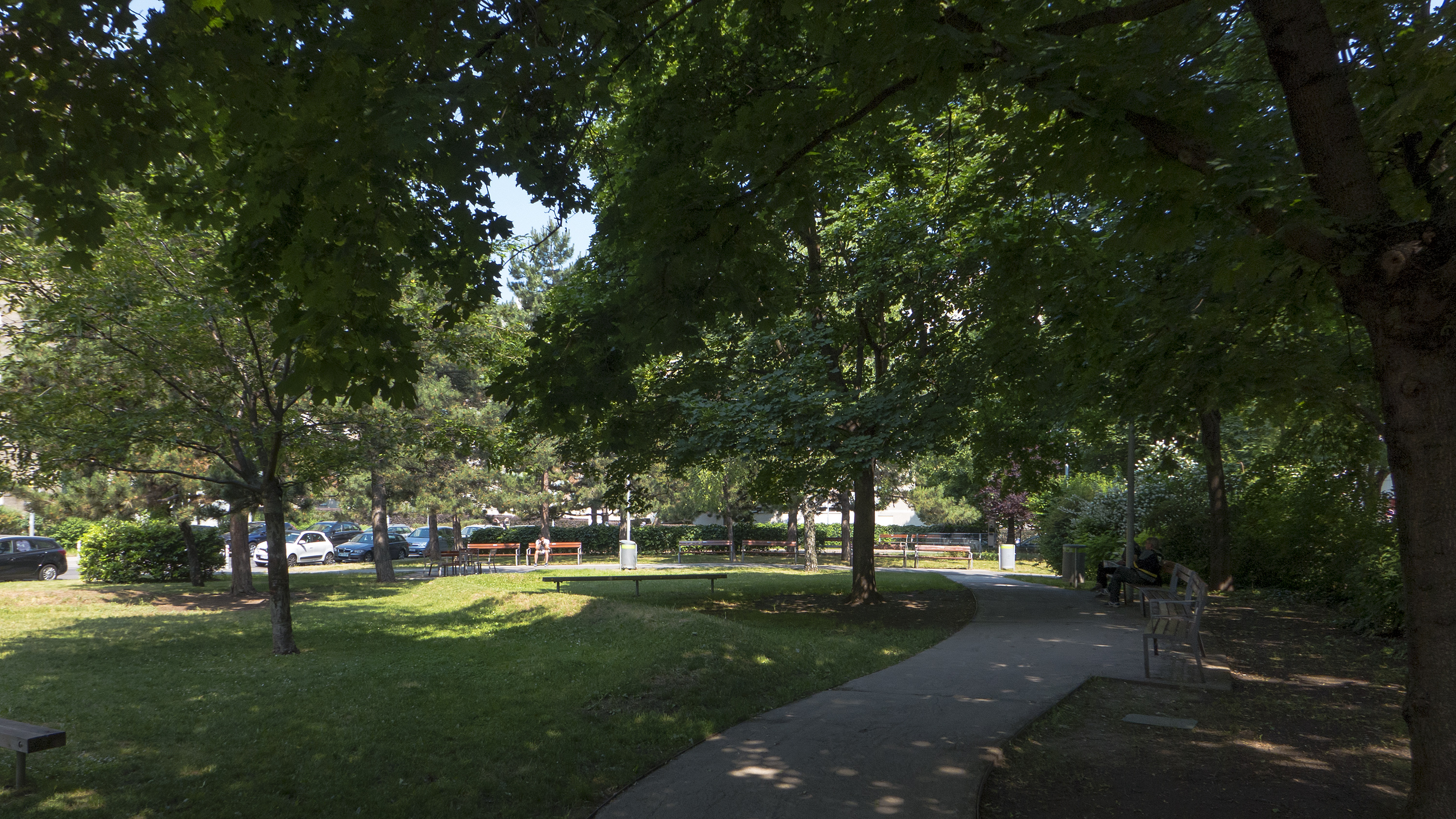 Braunhuberpark in Wien 11